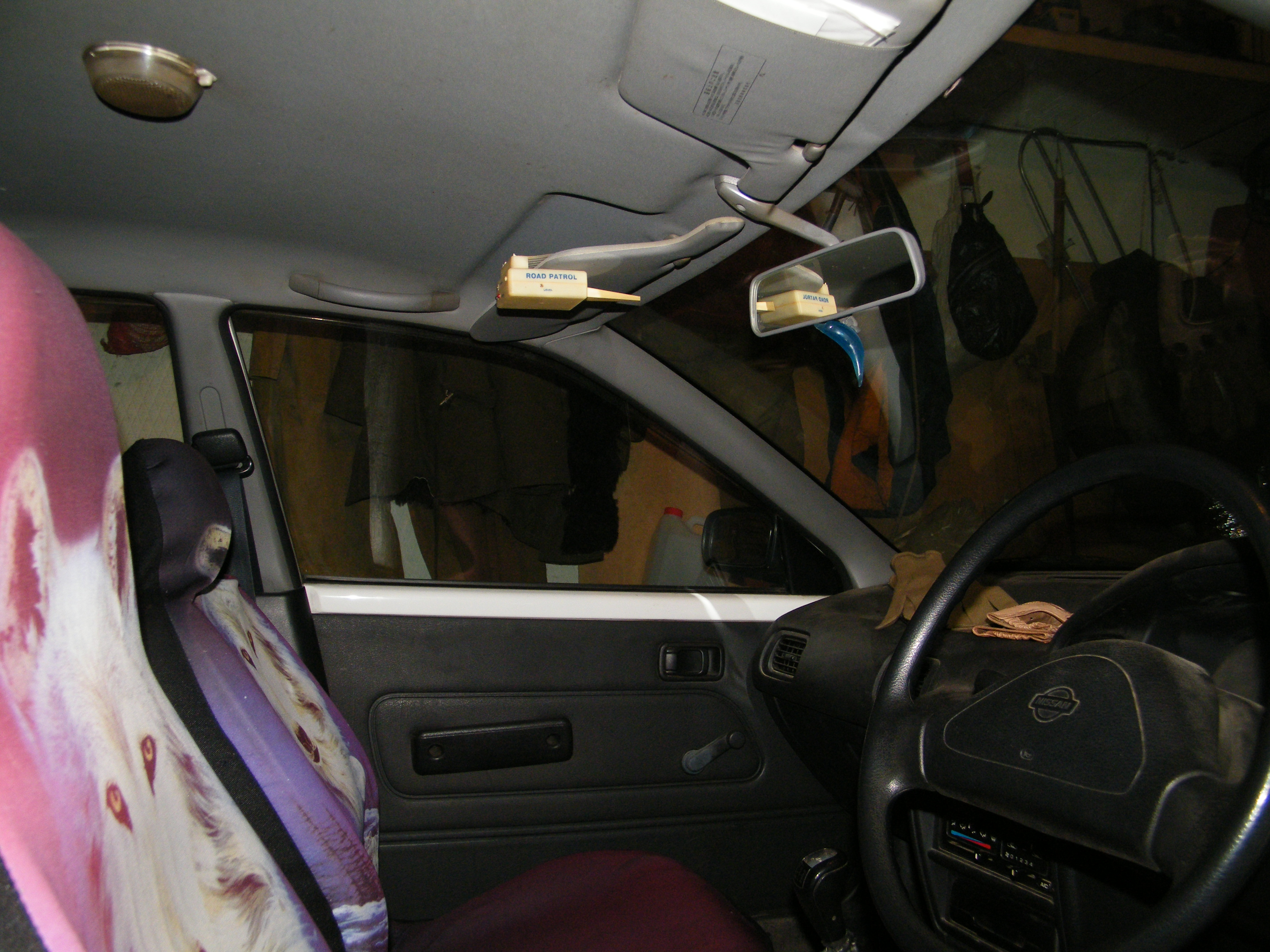 Антирадар в салоне автомобиля Nissan-Avenir 4WD